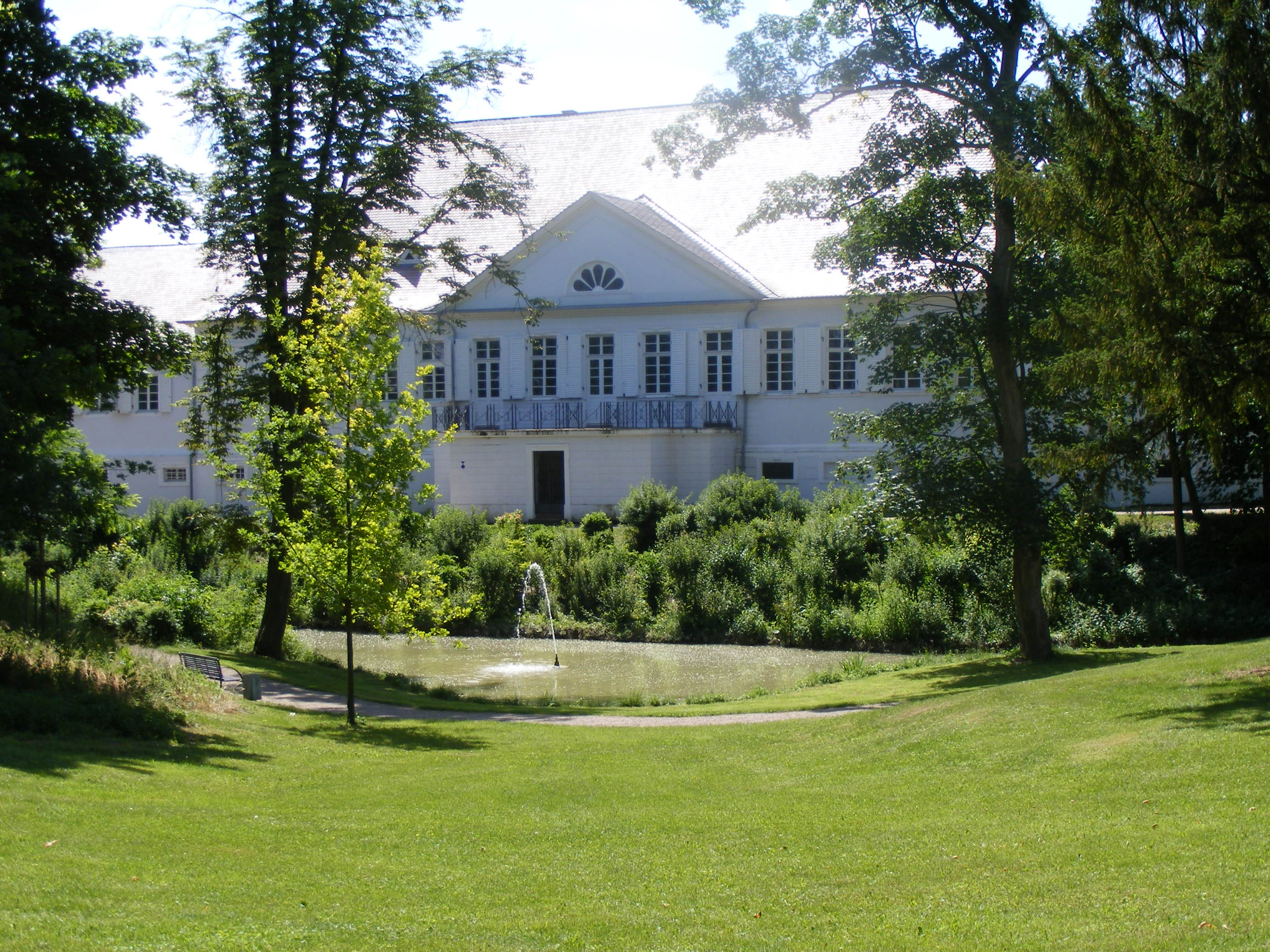 Koeth-Wanscheidsches Schloss in Dirmstein, Nordfassade mit Schlosspark